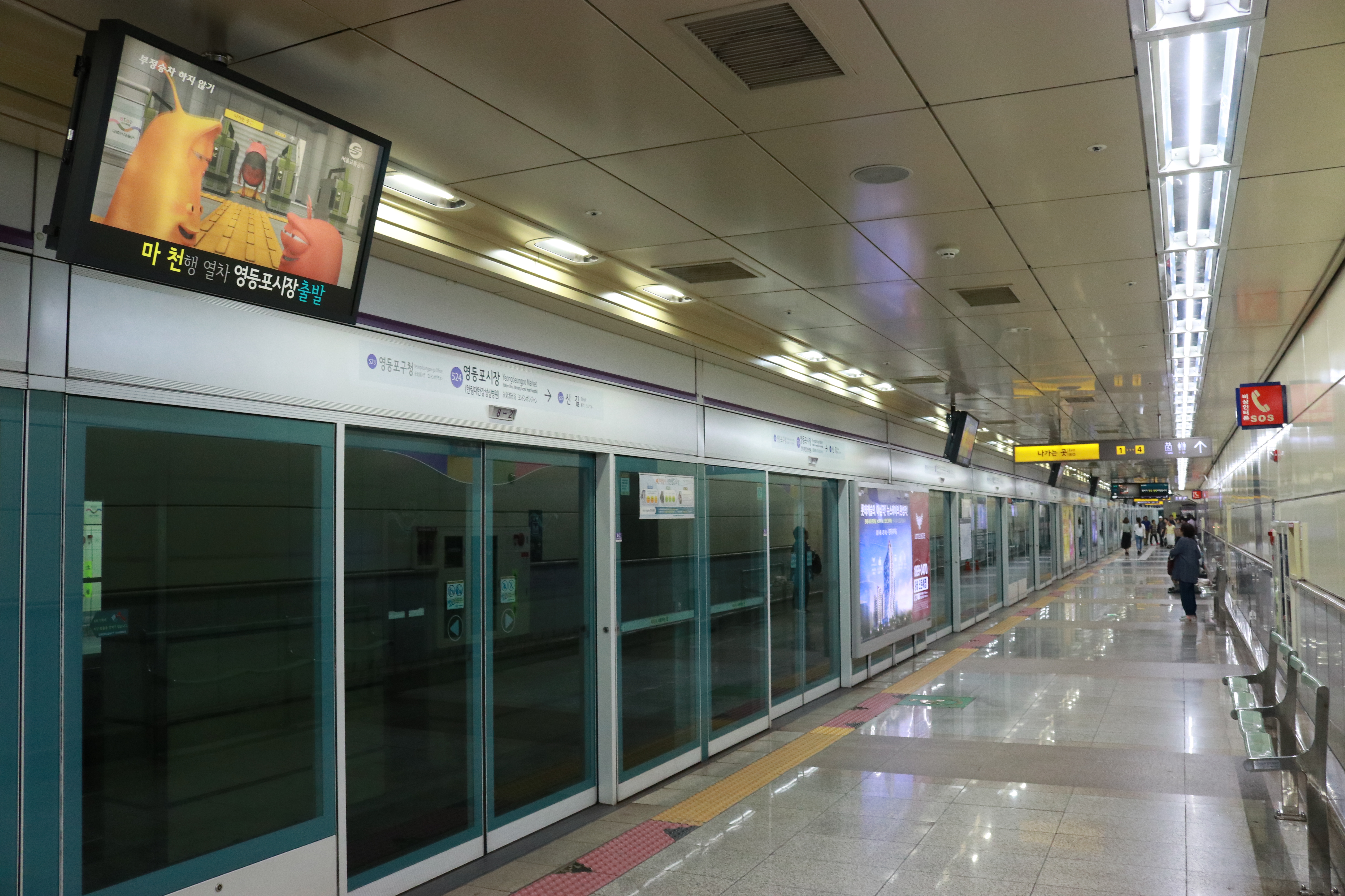 영등포시장역 승강장